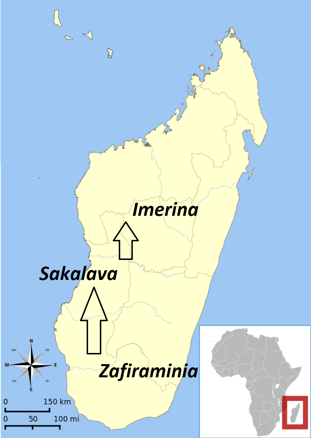 Parcours théorique de la transmission de l'épopée d'Ibonia, dans sa version de 1830, selon les travaux de Noiret